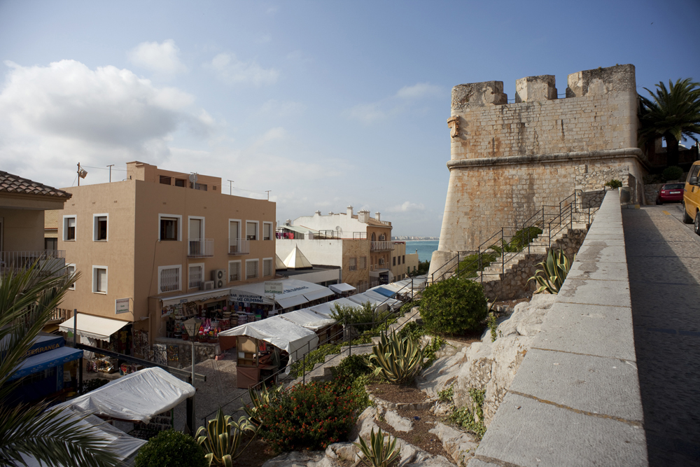 Peñiscola - ?